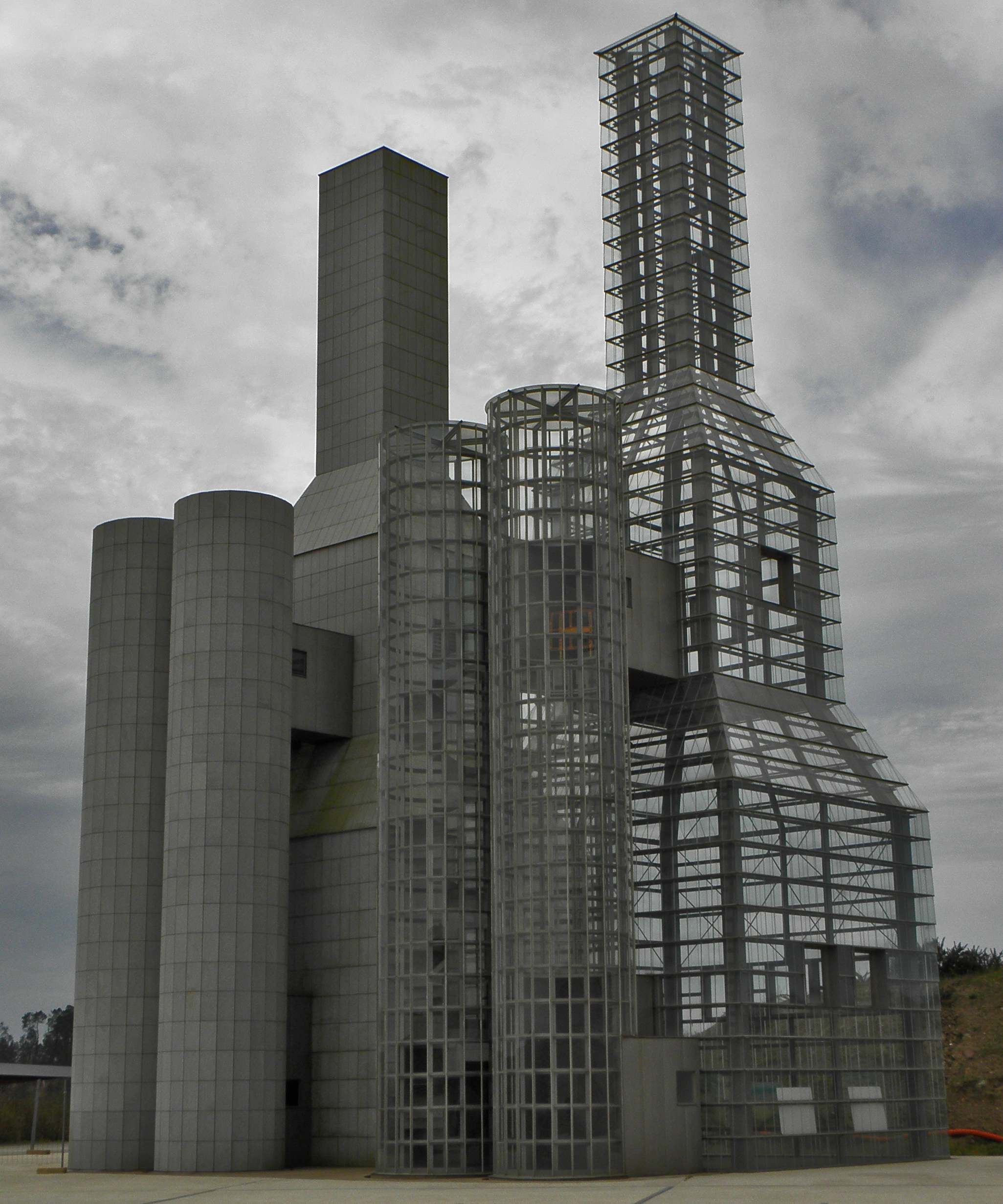 As torres da Cidade da Cultura son un proxecto do singular arquitecto John Hejduk que se remonta ao ano 1992, e que estaban pensadas para ser situadas no Parque de Belvís, onde albergarían actividades pedagóxicas complementarias ao xardín, funcionado como torres botánicas. O proxecto non chegou a materializarse e, trala morte do arquitecto no ano 2002, o responsable do proxecto da Cidade da Cultura, Peter Eisenman, decidiu incluílas na súa obra, en homenaxe ao desaparecido autor. As torres, xa construídas, intégranse por tanto no complexo da Cidade da Cultura, aínda en construción, asumindo funcións de recepción, información e exposición. Están situadas cara ao sur, moi preto da biblioteca e do futuro parque forestal que inclúe o proxecto. Son dúas pezas escultóricas iguais en forma, de singular volumetría: un prisma que ascende ata os 20 m de altura e que vai perdendo sección a medida que crece, ata converterse en algo parecido a un lucernario. Aínda que en forma son iguais están revestidas de diferente maneira: sobre unha estrutura metálica que lles da forma, unha delas revístese exteriormente con pedra mentres que a outra o fai en vidro. En palabras de Eisenman, John Hejduk concibiu as torres como "a igrexa sen corpo", unha idea que queda un tanto desvirtuada por ter sido cambiadas de localización, aínda que no lles fai perder o seu misterioso encanto. Dende a distancia, mirando cara ao promontorio onde se sitúan as torres, as súas siluetas recórtanse como réplicas abstractas das torres da Catedral, un pouco máis aló no horizonte da cidade.